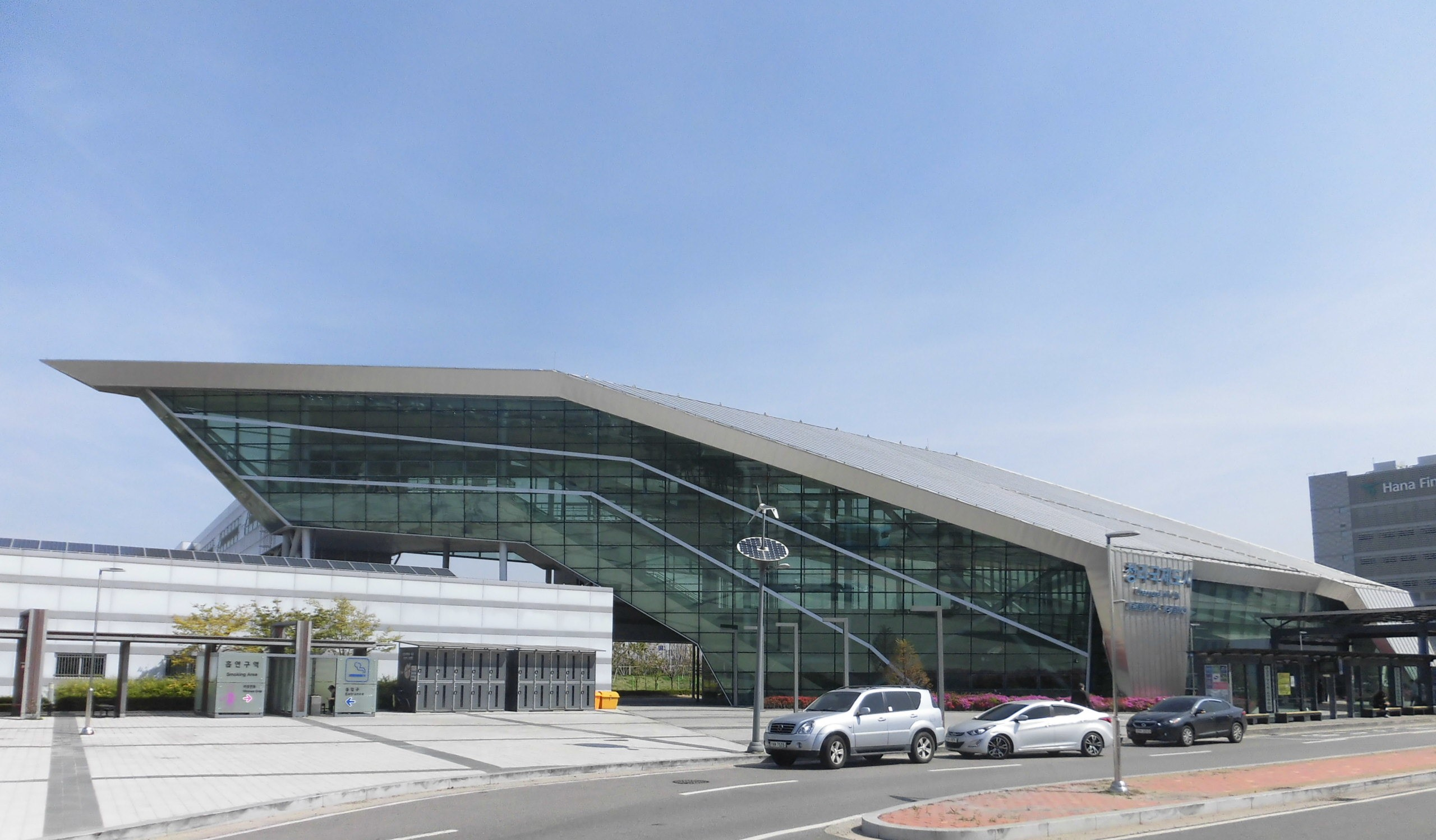 공항철도 청라국제도시역